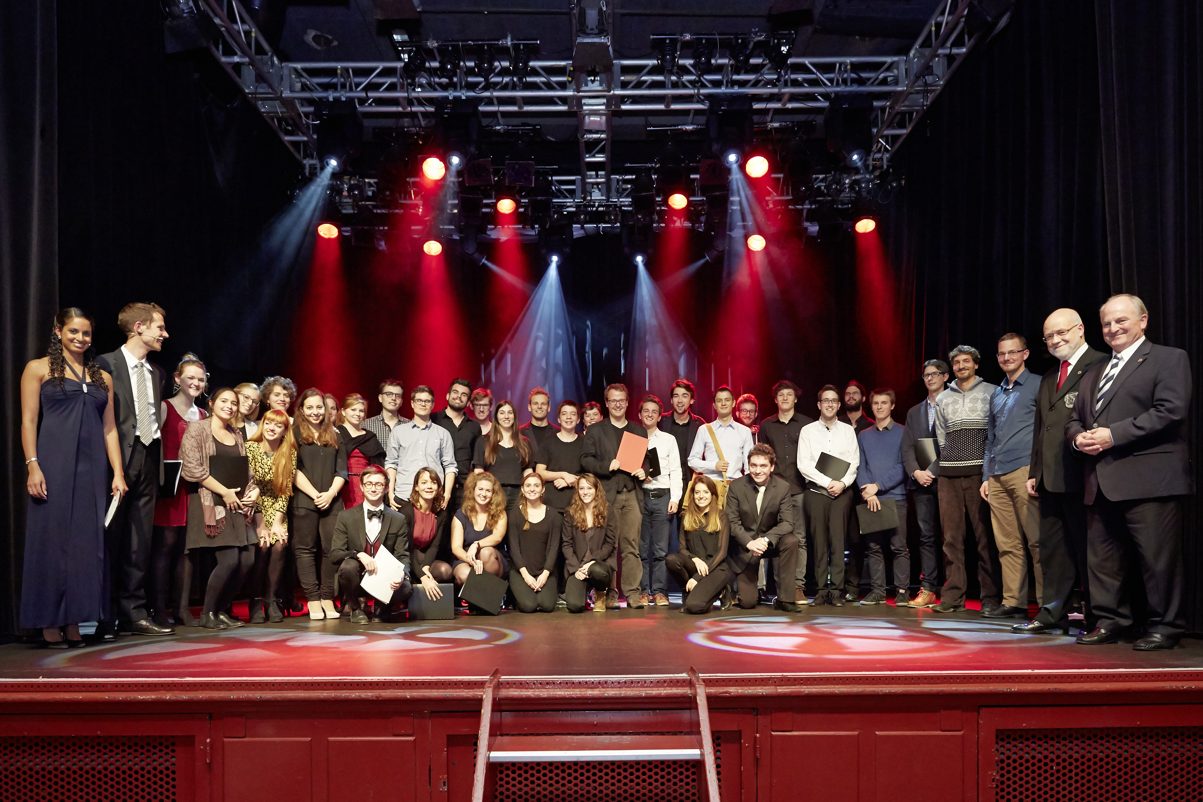 Jugendpreisverleihung 2014, 20-jähriges Jubiläum